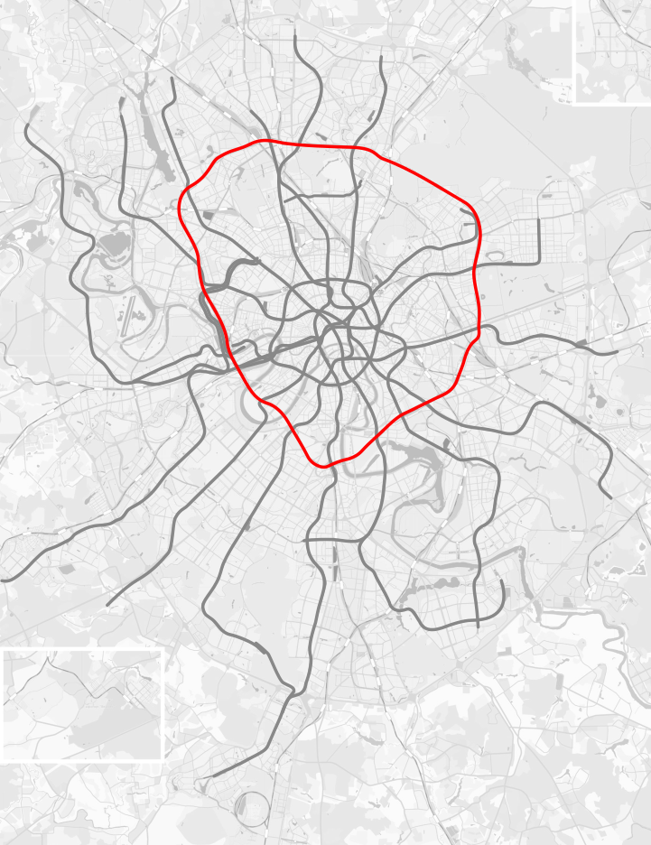 Московское центральное кольцо